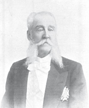 Fotografía retrato de José de Murga y Reolid Michelena y Gómez, 1er marqués de Linares, 1er vizconde de Llanteno.